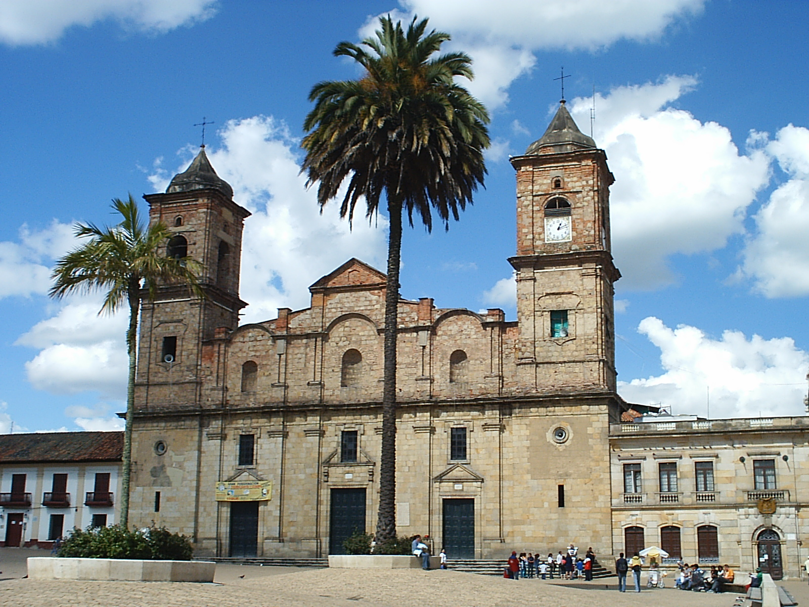 Centro Urbano de Zipaquirá